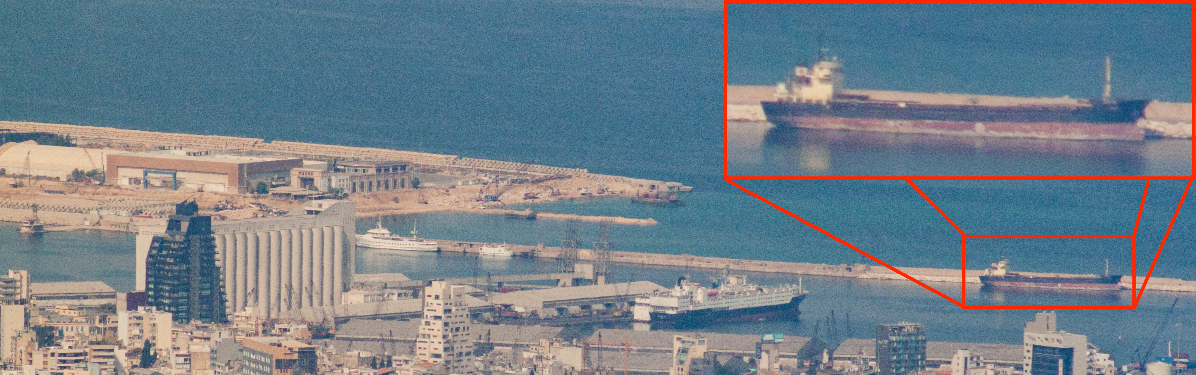 MV Rhosus in de haven van Beiroet, ingezoomd.